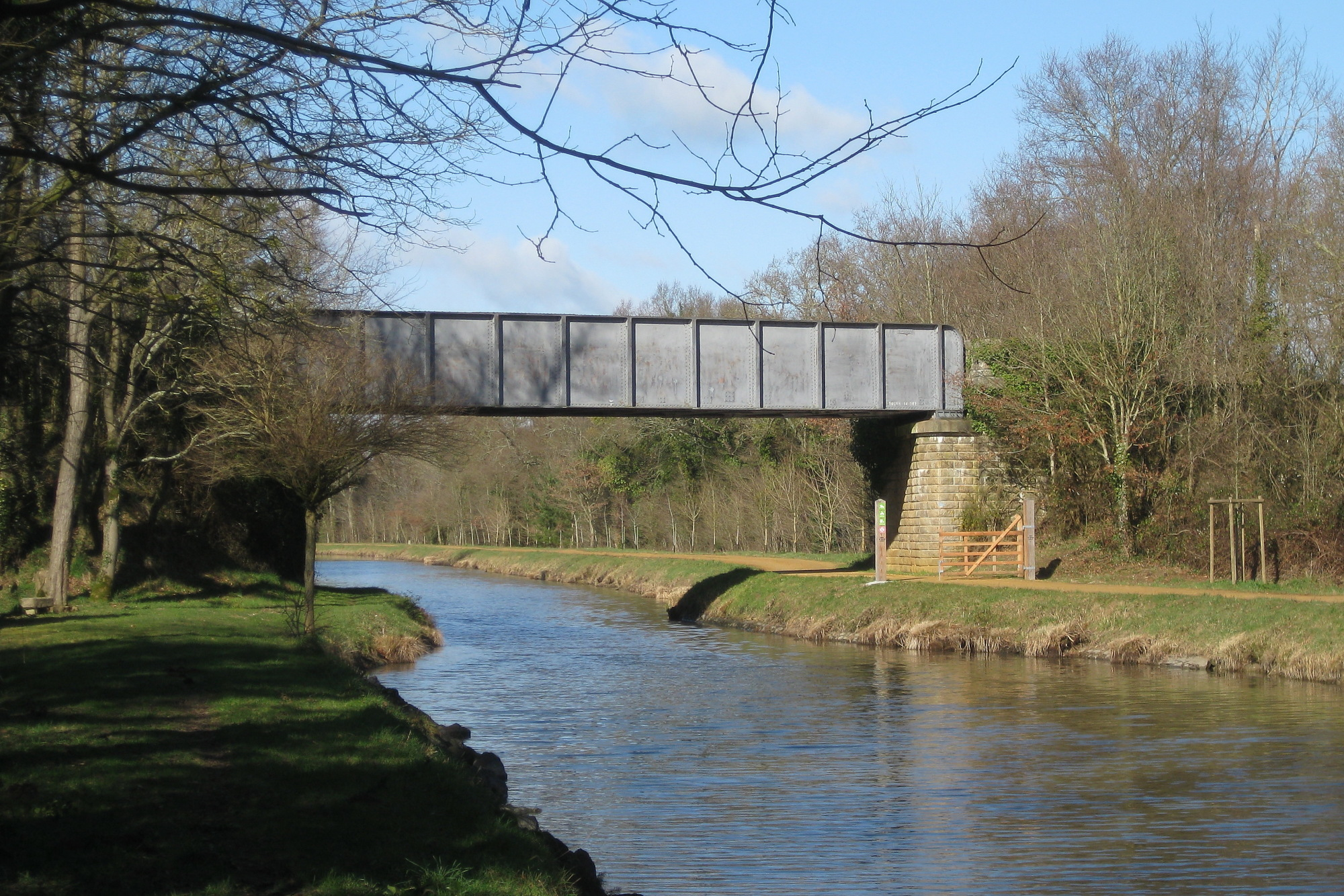 Le pont ferroviaire de la ligne Nantes - Châteaubriant sur le canal de Nantes à Brest, avant le remplacement de son tablier en 2011.